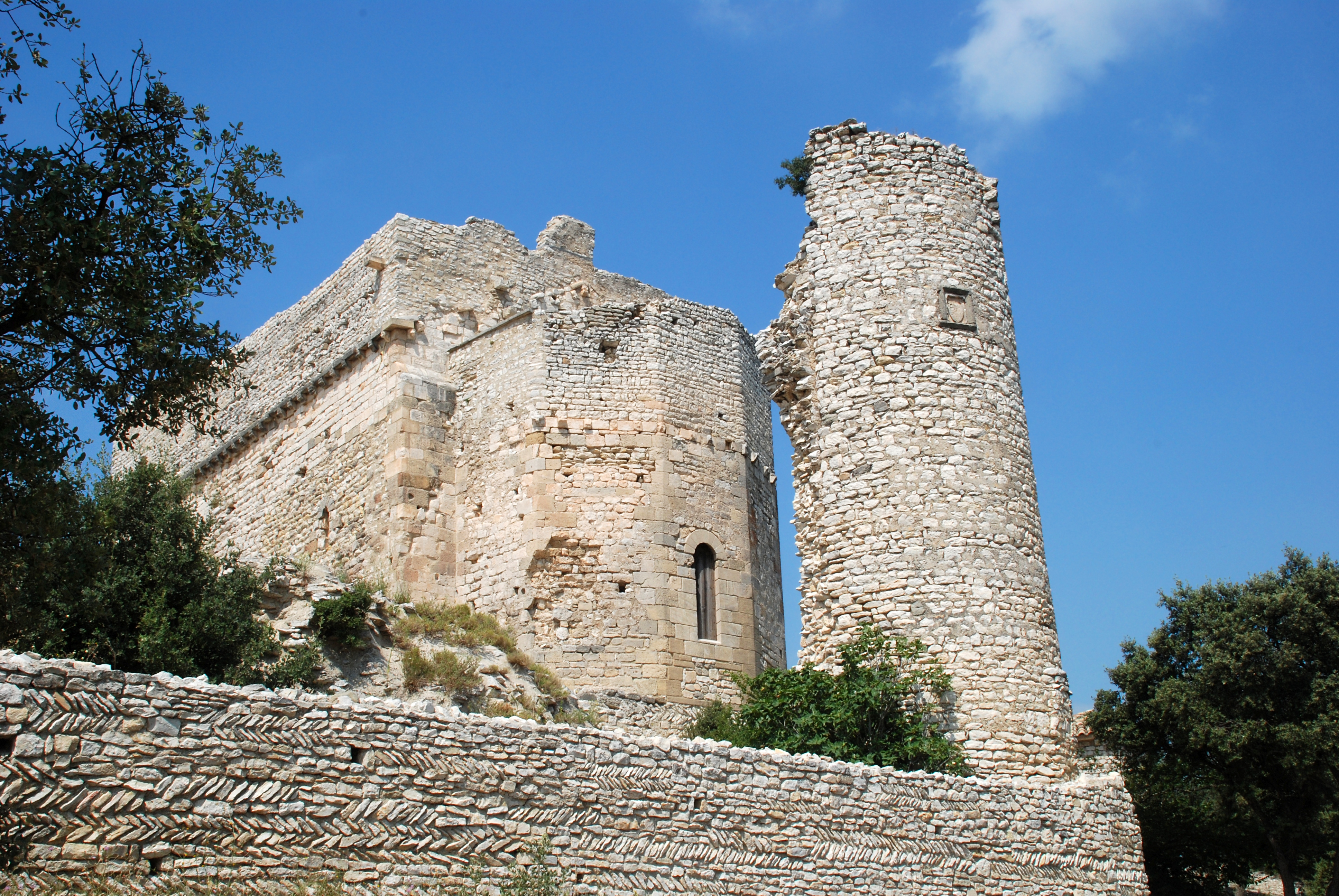 France - Provence - Vaucluse - Le Thor - Église Sainte-Marie de Thouzon